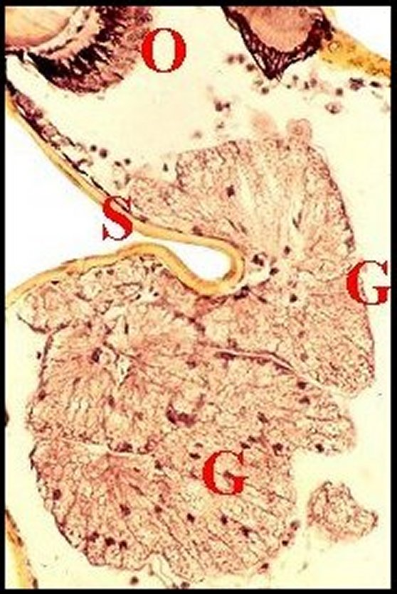 Glande clypéale d' Argyrodes zonatus